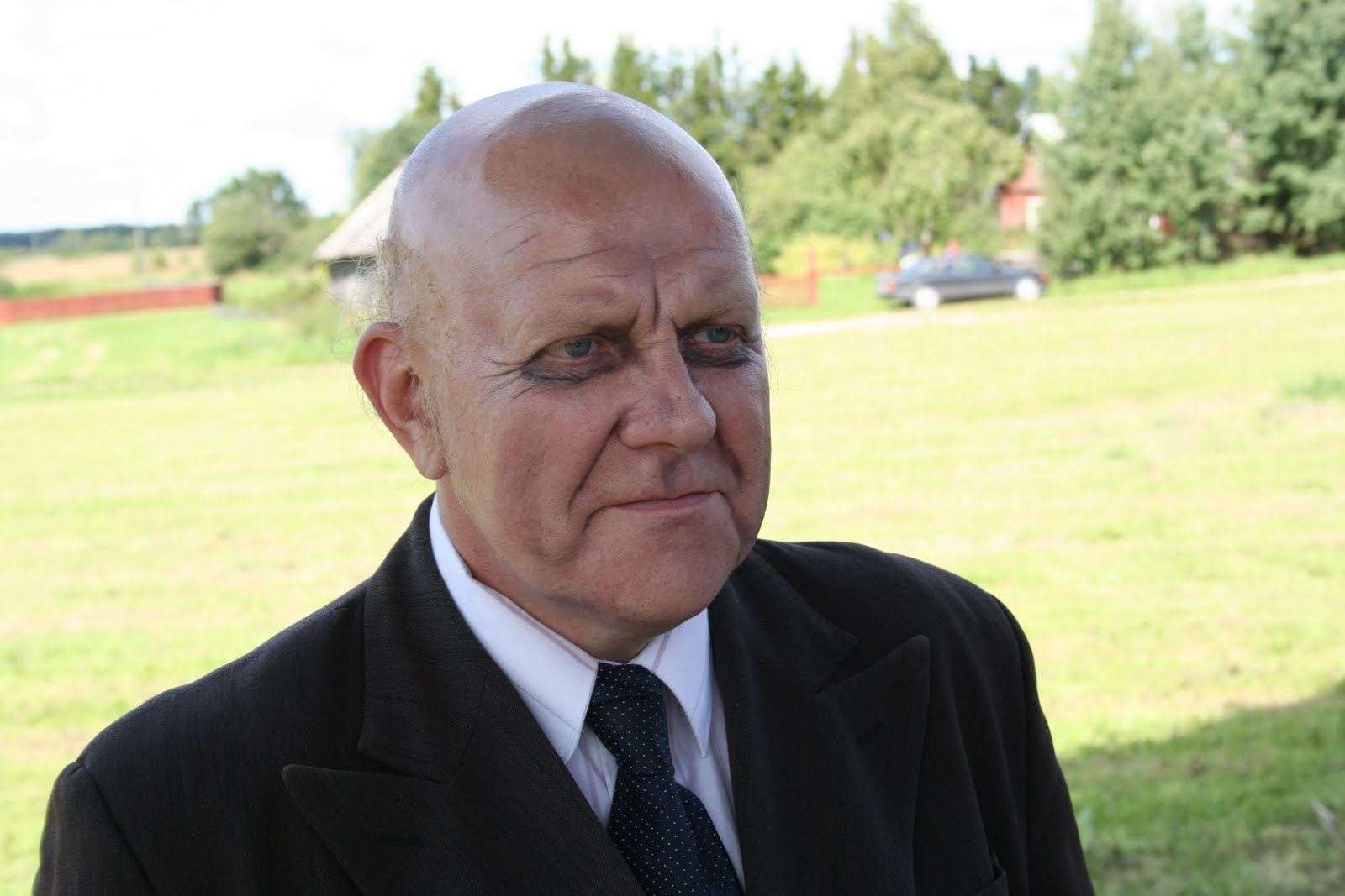 Andrus Vaarik mängimas Ivan Oravat.